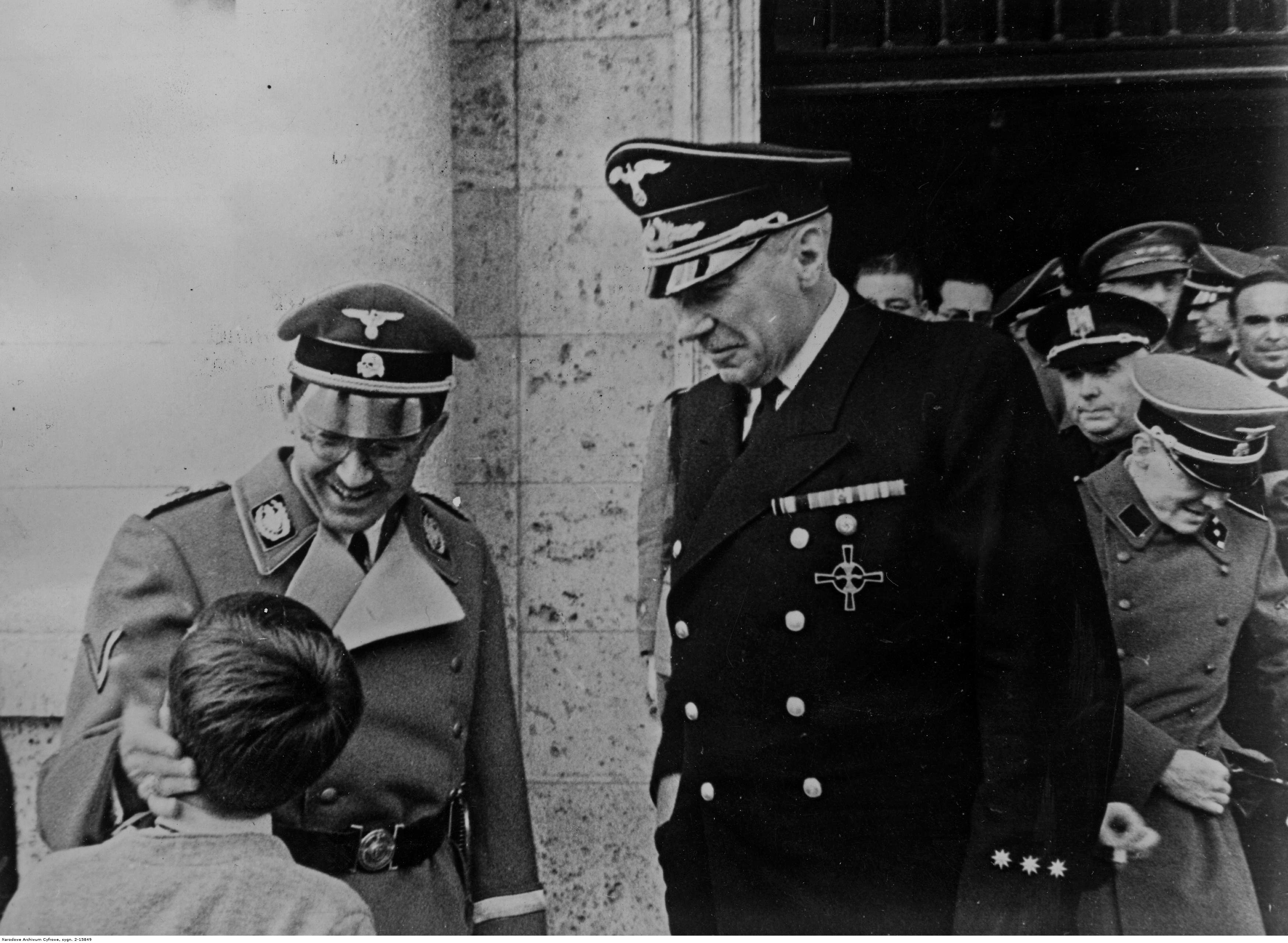 El líder nazi Heinrich Himmler junto al embajador alemán en España, Eberhard von Stohrer, en Madrid.